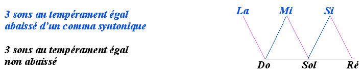 Temperament 24 pour 6 sons